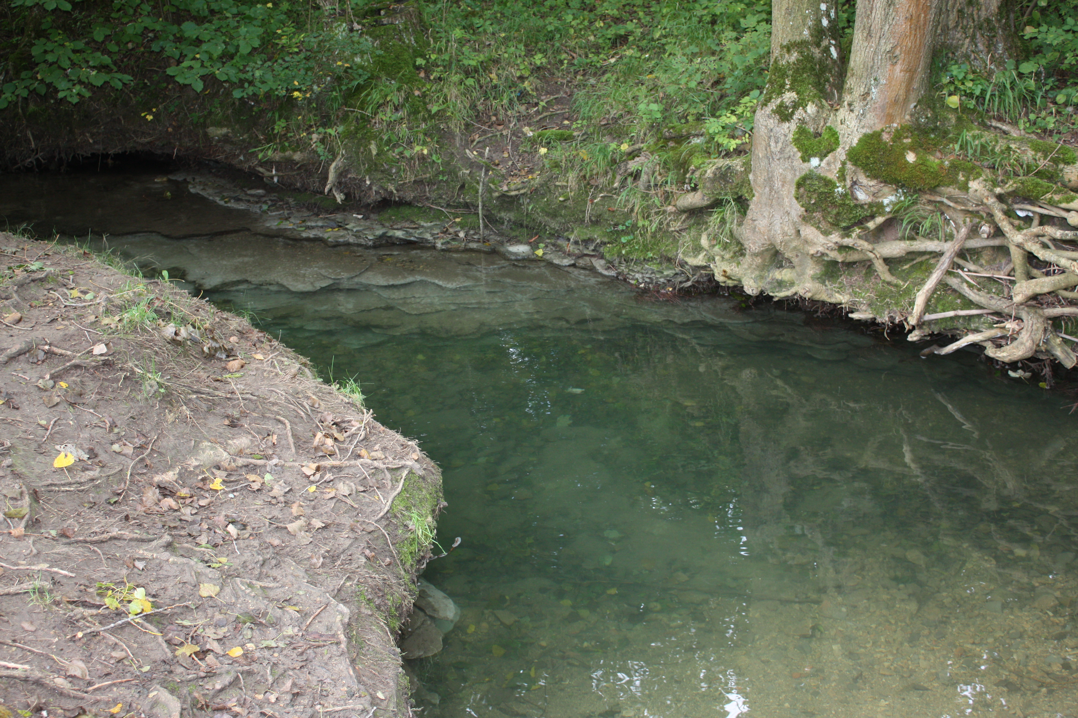 Der Klotzbach, ein Nebenfluss der Rems, auf Böbinger Gemarkung in der Nähe der Gemeindegrenze zu Heubach (in der Nähe des ehemaligen Freibades Oberböbingen)